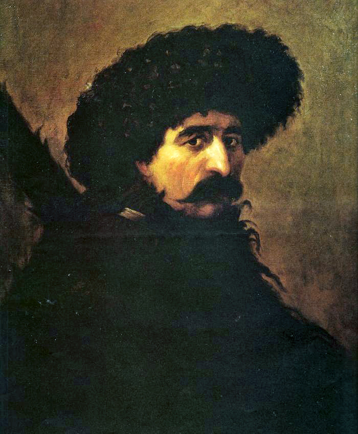 Автопортрет Петра Захарова-Чеченца в национальном костюме.